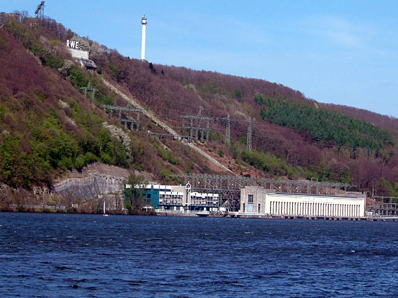 Das Koepchenwerk am Hengsteysee in Herdecke